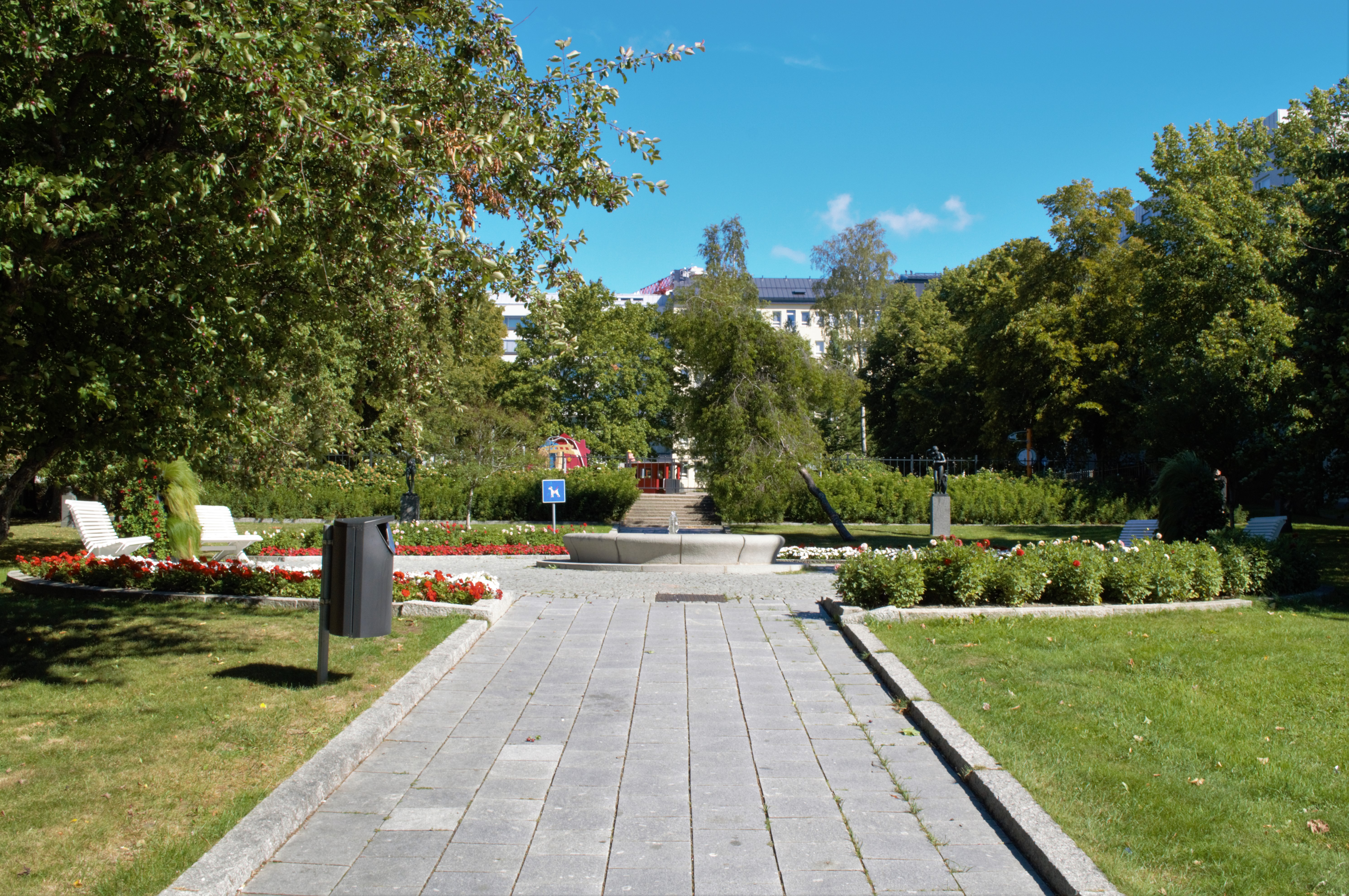 Setterbergin puisto